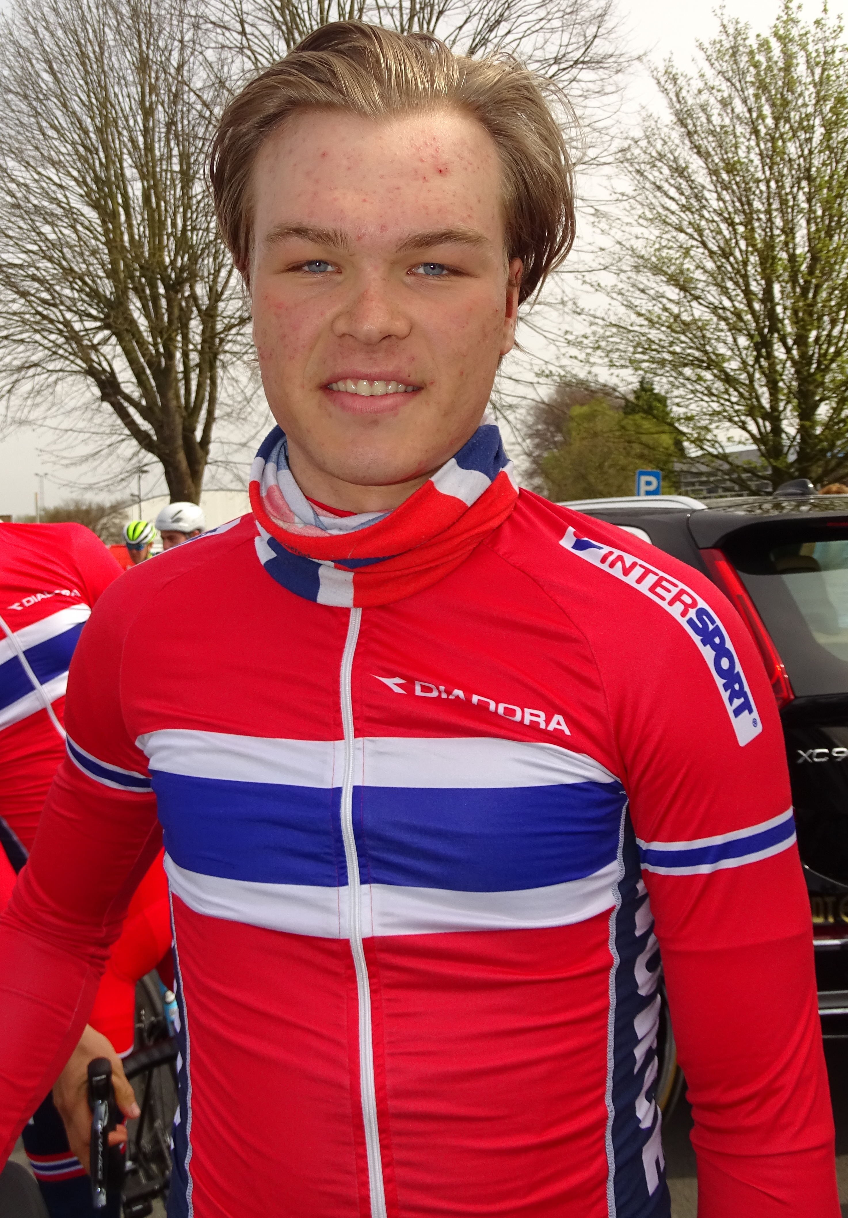 Reportage réalisé le samedi 9 avril à l'occasion du départ et de l'arrivée du Tour des Flandres espoirs 2016 à Audenarde, Belgique.